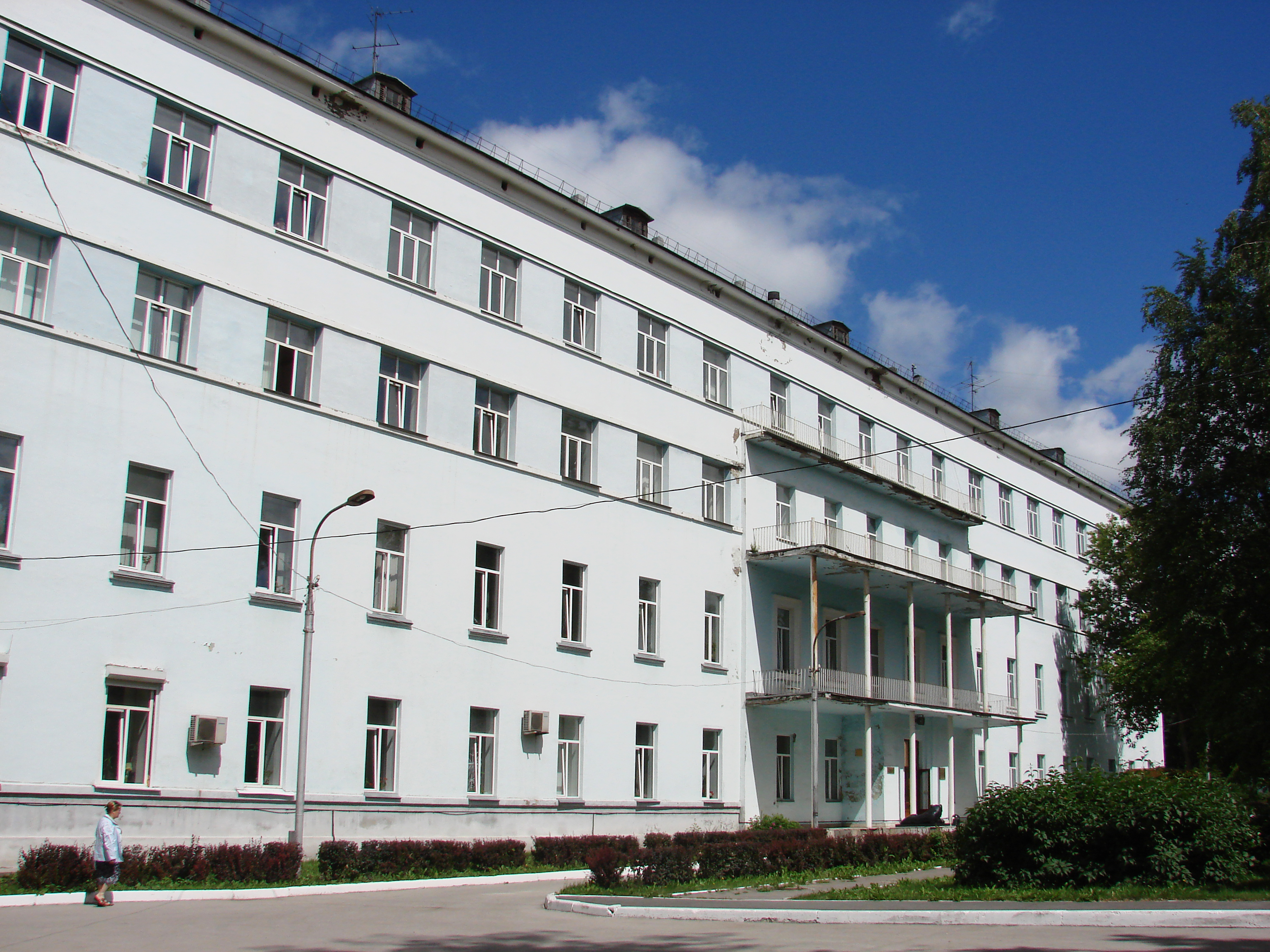 Здание, где в губернской земской (ныне областной) больнице работали ученые-медики Шишонко В.Н., Моллесон И.И., Чистяков П.И. 1827-1833 гг. В 1950-е надстроены 2 этажа. Пермь, улица Пушкина, 85